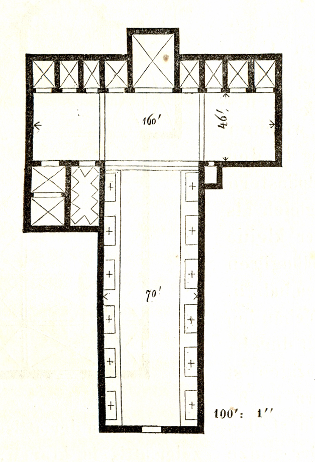 Holzschnitt aus den Mittheilungen der kaiserl. königl. Central-Commission zur Erforschung und Erhaltung der Baudenkmale Band 5, 1860. Beitrag von Wilhelm Lübke mit dem Titel: „Reisenotizen über die mittelalterlichen Kunstwerke in Italien“, 1858/1859, gemeinsam mit Karl Schnaase Druck: k. k. Hof- und Staatsdruckerei Zuordnung der Zeichnungen entsprechend dem Dateinamen